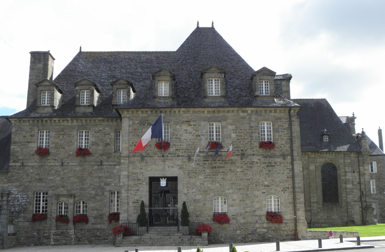 Hôtel de Ville de Guingamp (22).